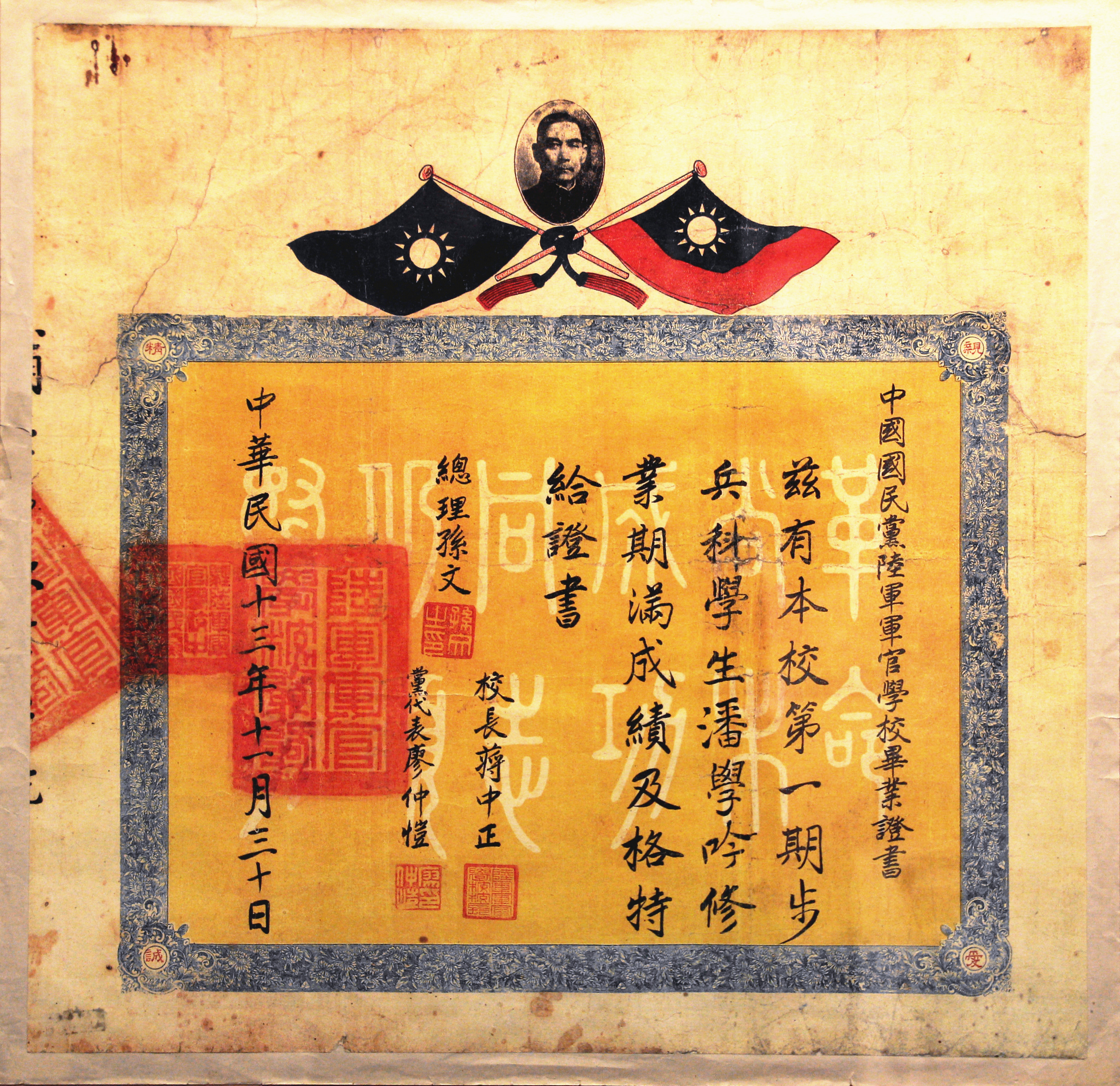 中國國民黨陸軍軍官學校畢業證書。中華民國十三年十一月三十日。